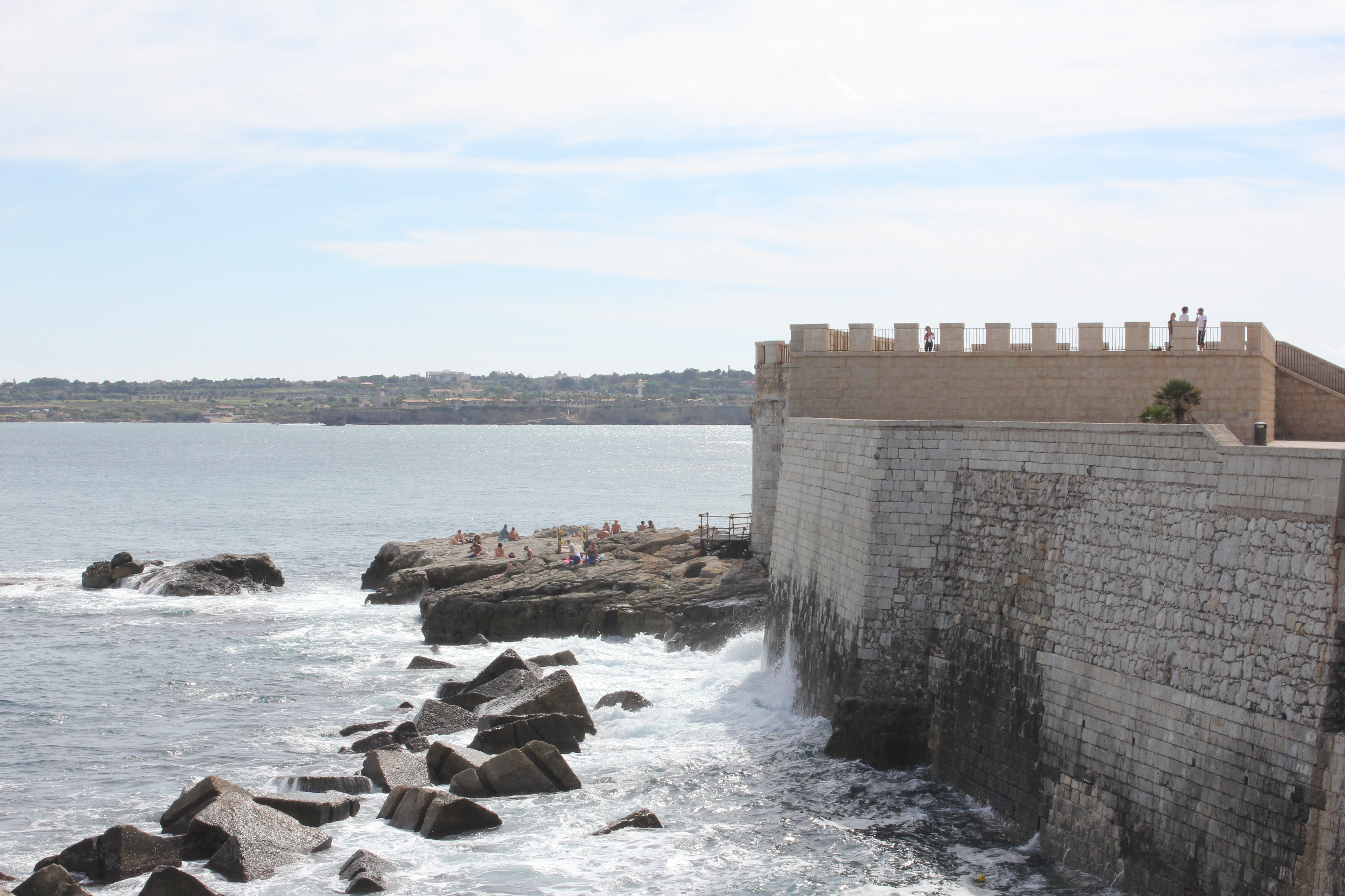 Ortigia, Syracuse - Forte vigilena